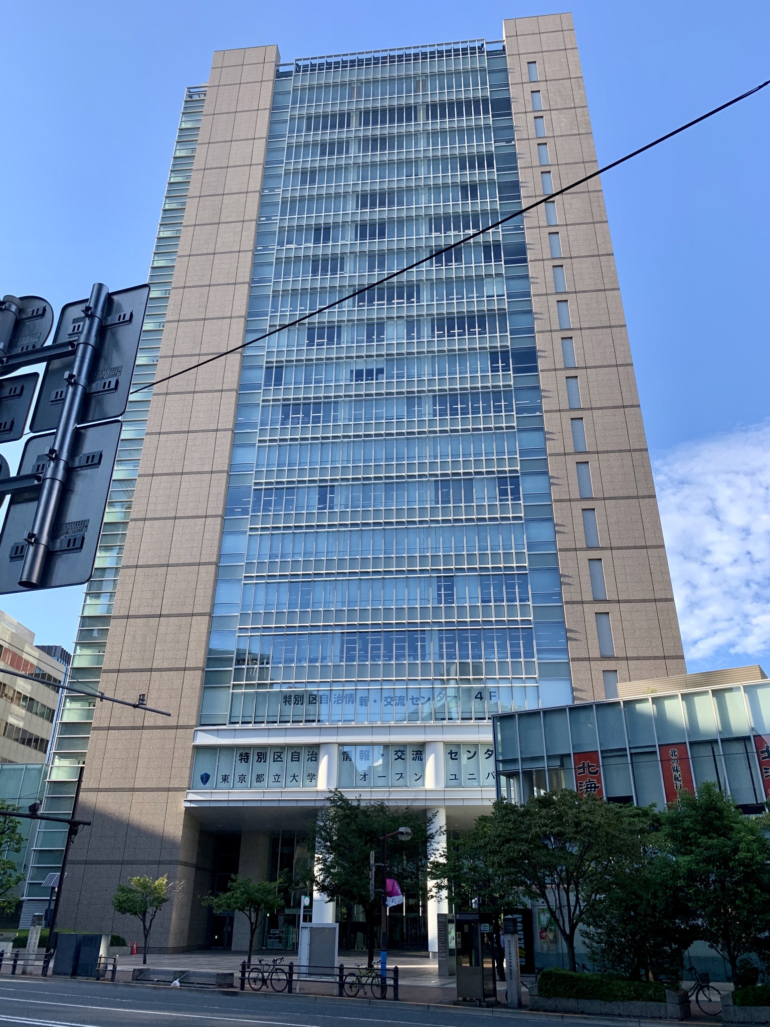 東京都千代田区飯田橋3-5-1に所在する東京区政会館